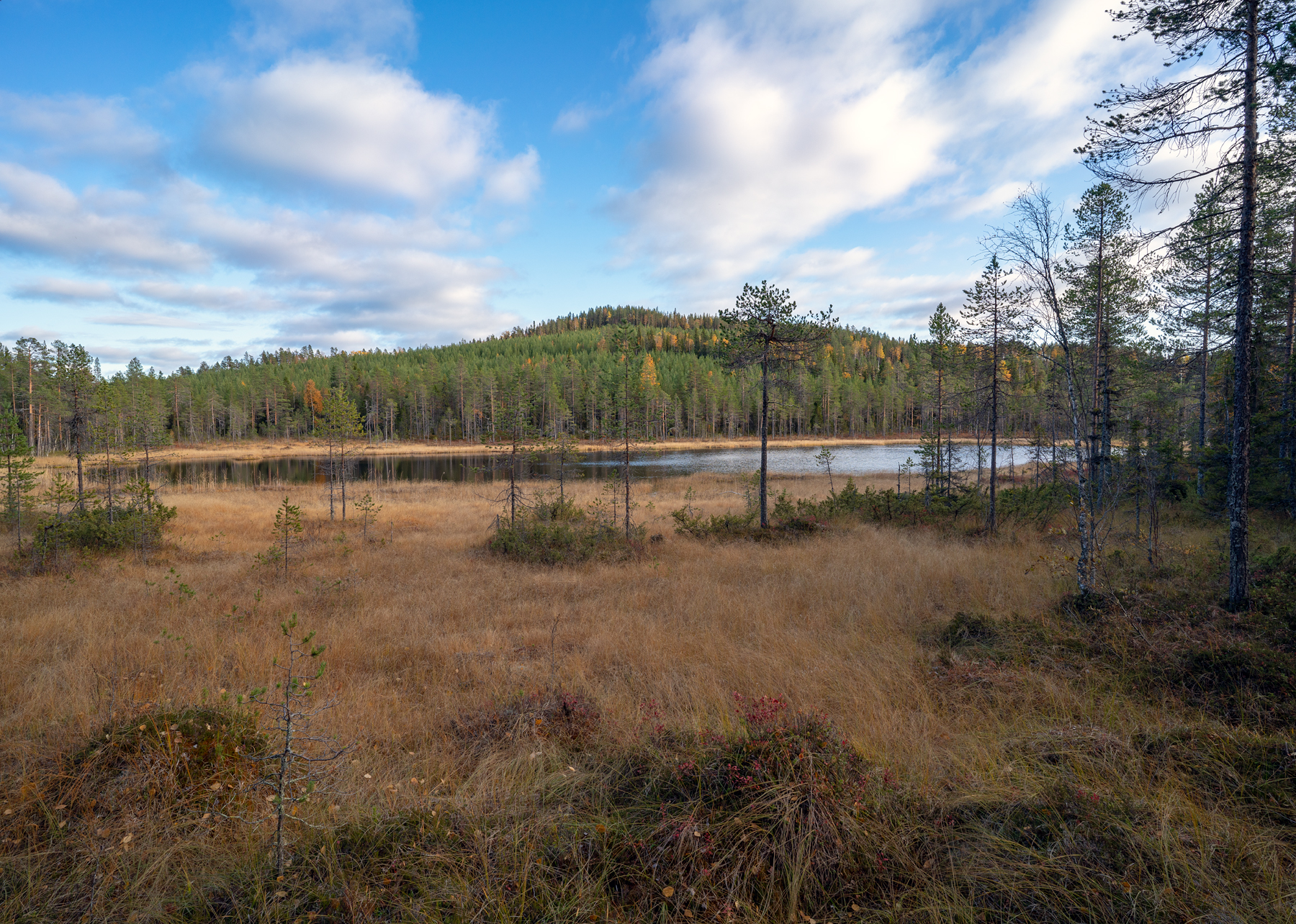 Den nordligaste av Lundbäckstjärnarna. I bakgrunden den drygt 370 meter höga Svartsjökullen.